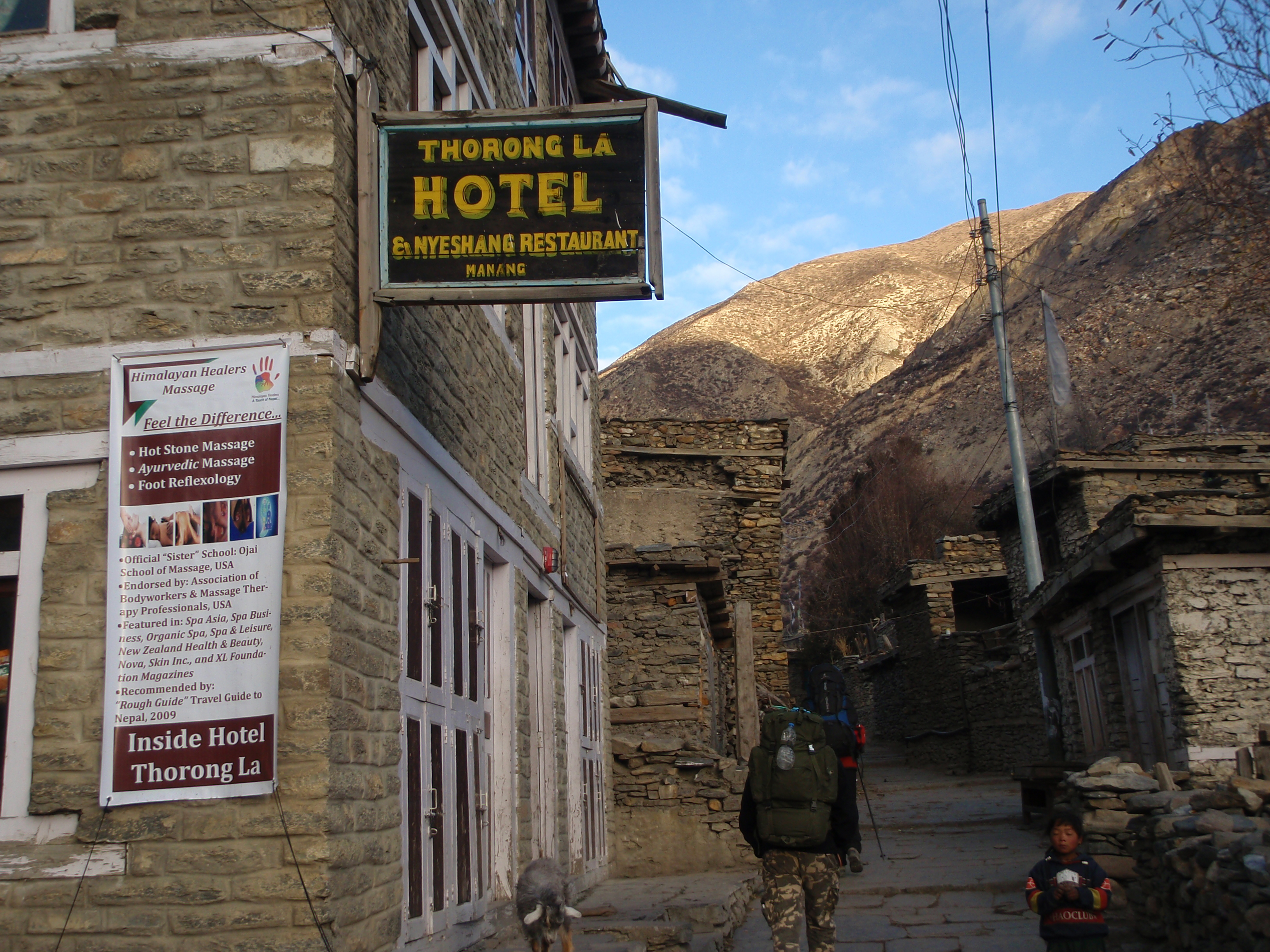 Типова вуличка Мананґу